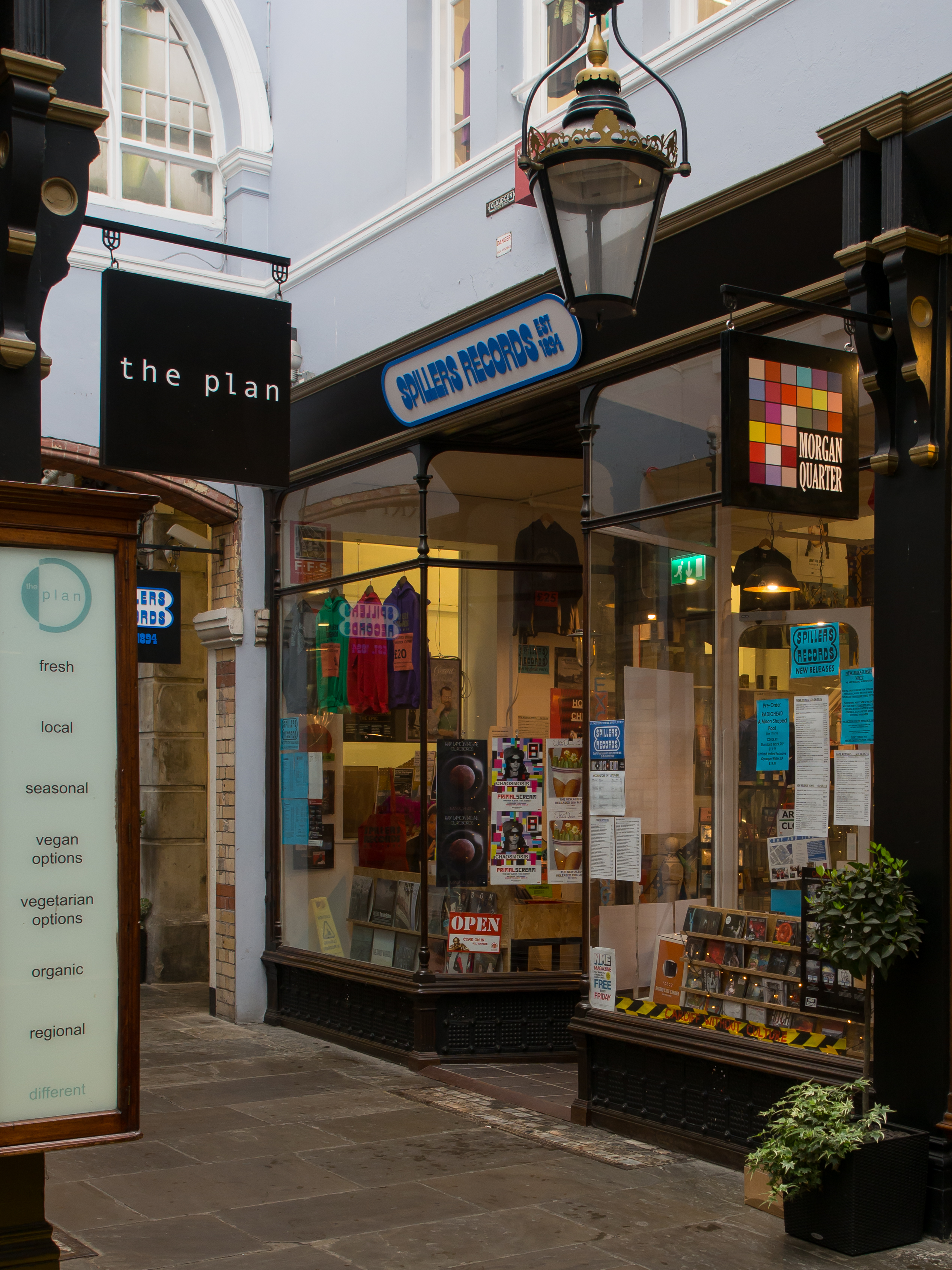 Morgan Arcade, Cardiff